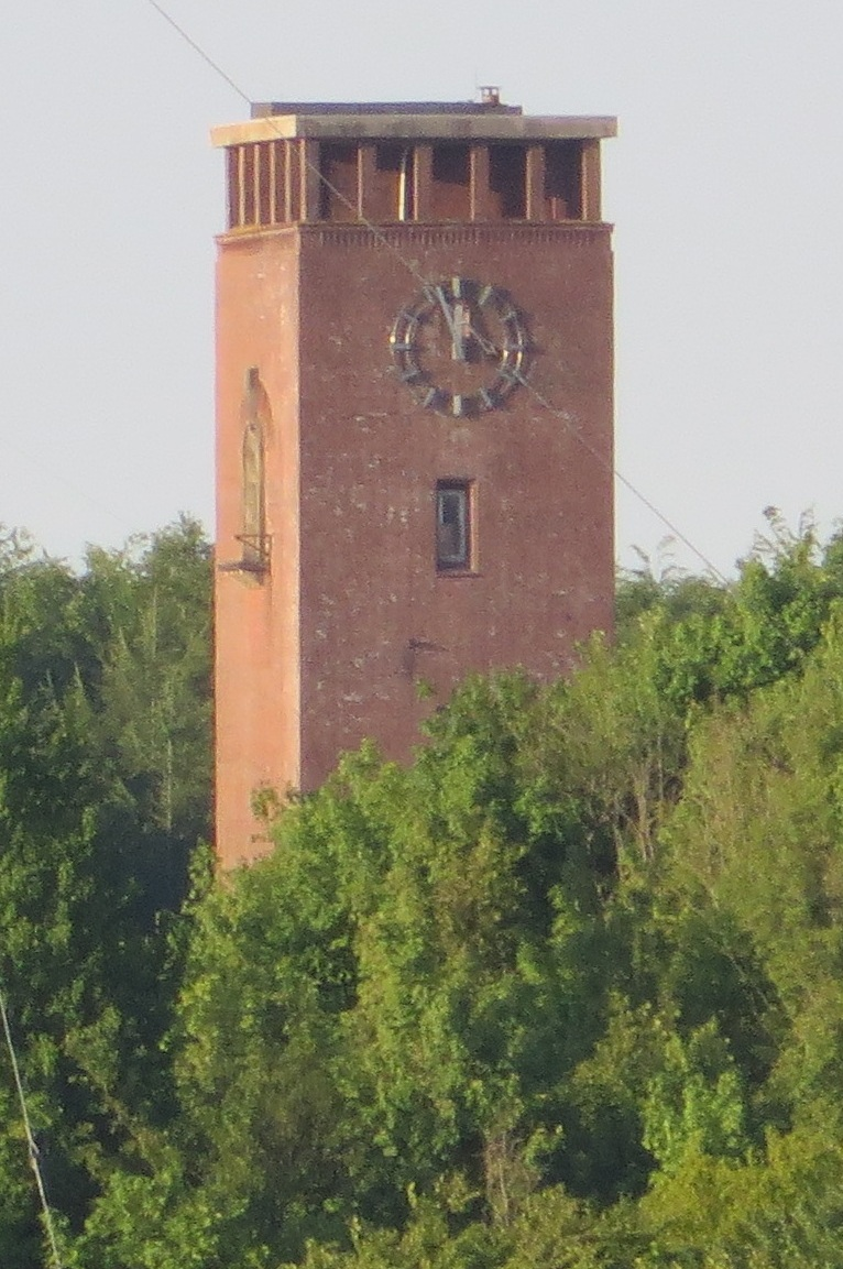 Uhrenturm des Flottenkommandos (2014), Bild 002